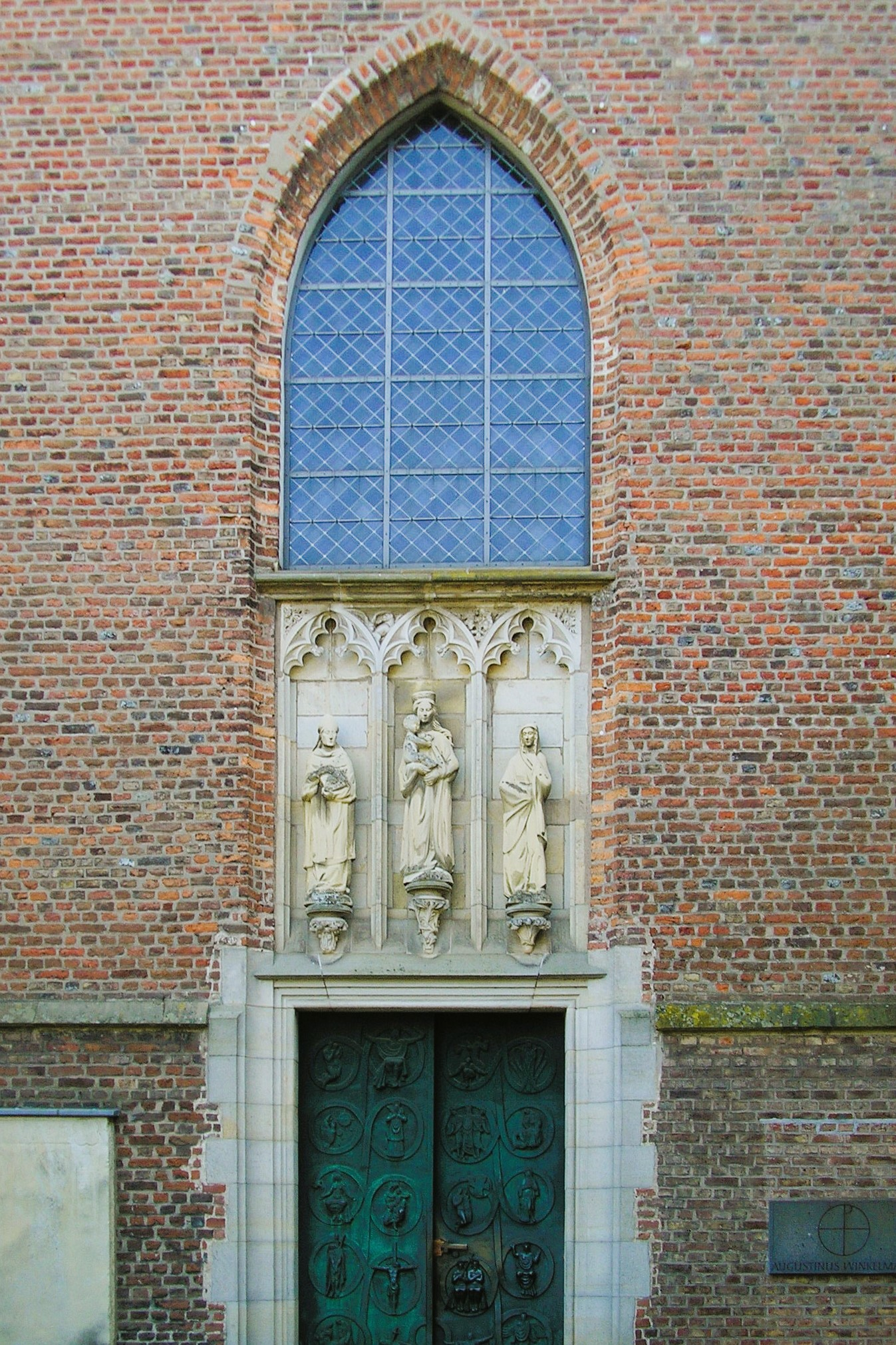 Kloster Marienthal, Westportal